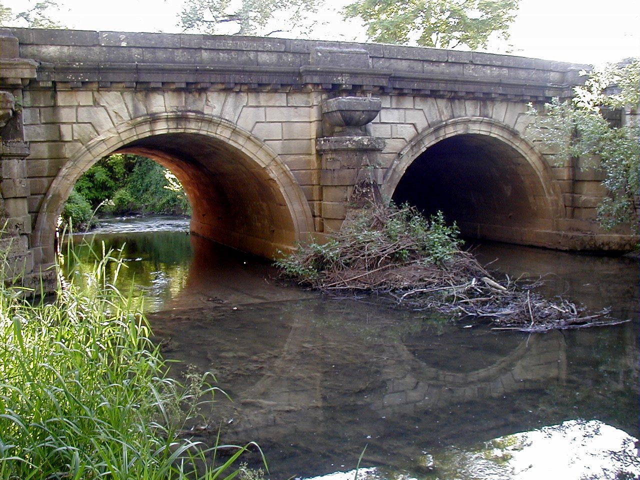 Chatenoy-le-Royal - Pont de la Thalie projeté par Gauthey - Ensemble côté amont